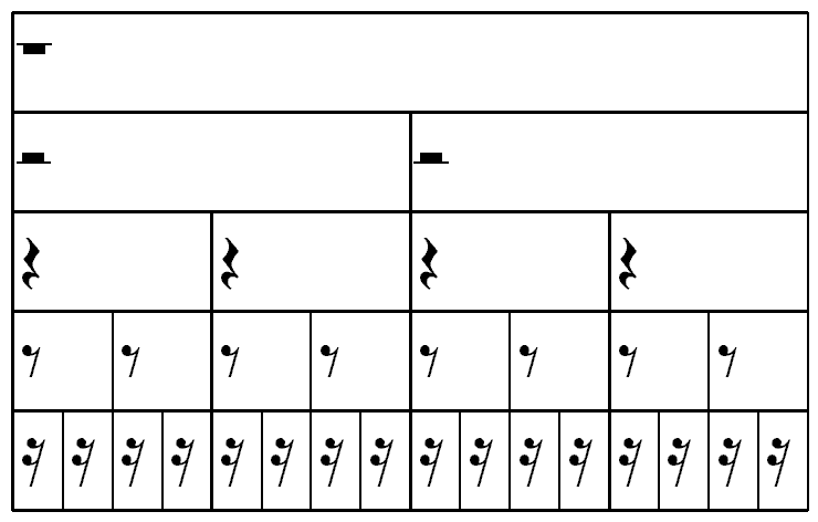 Valeur relative des figures de silences